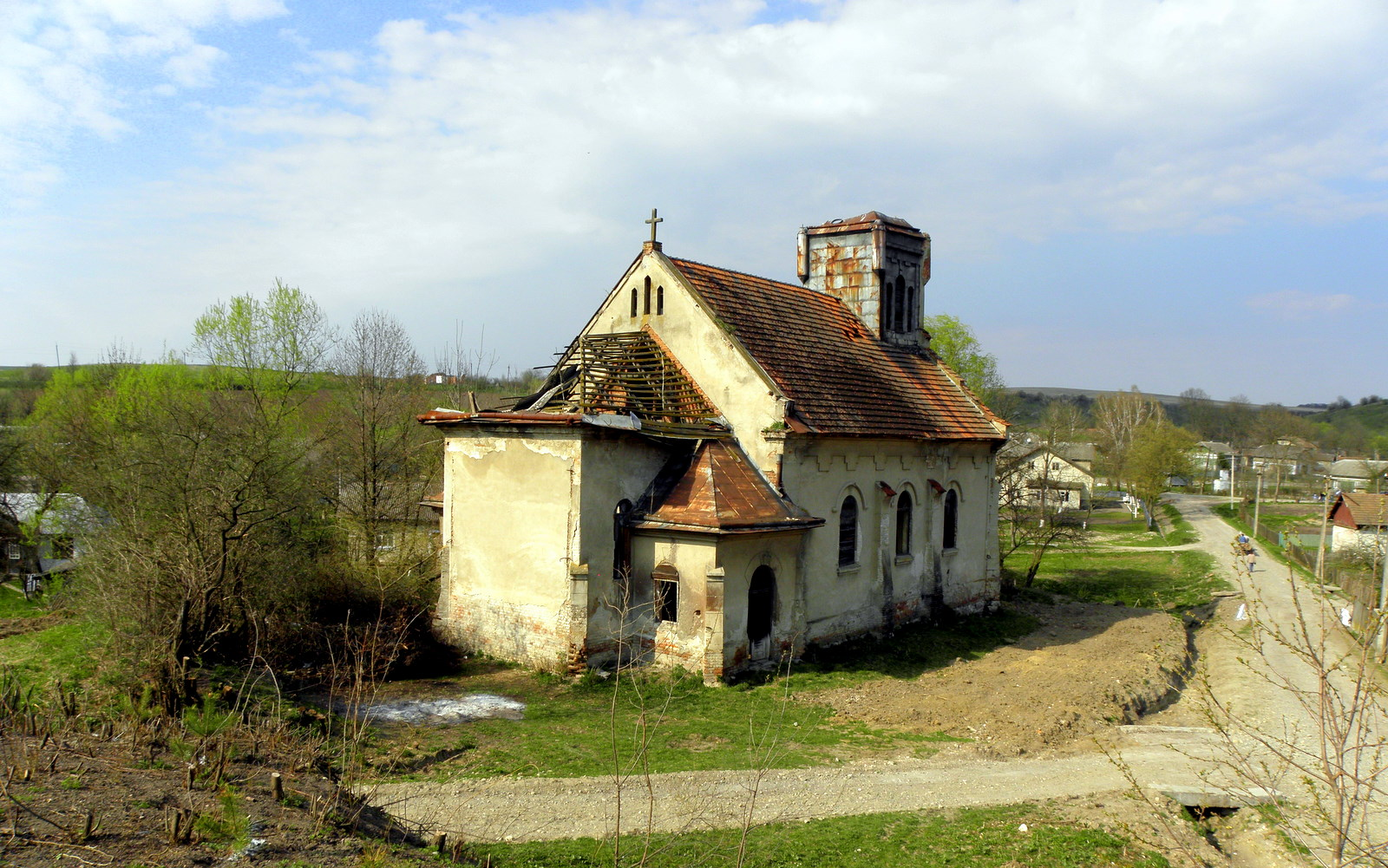 В південній частині Медухи в 1912-1913 р. був збудований (за допомогою львівського архієпископа Юзефа Білчевського) польський неороманський Костел Розарія діви Марії. Над входом в костел залишився напис "1913" та "Orędowniczko Różańca świętego, módl się za nami". Статус: пам'ятка архітектури місцевого значення. Реєстр. номер: 651.